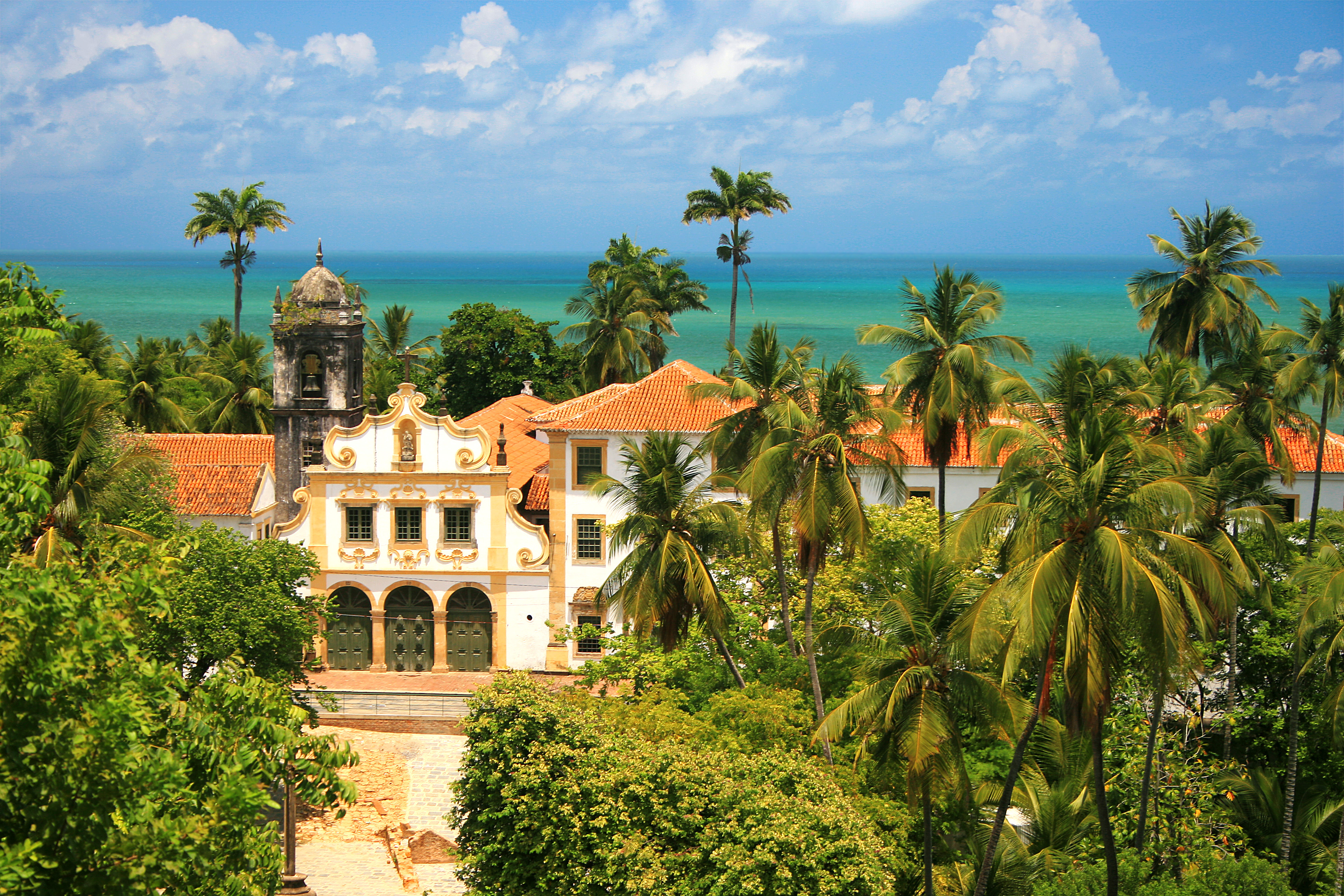 Convento de São Francisco - Olinda - Pernambuco - Brasil